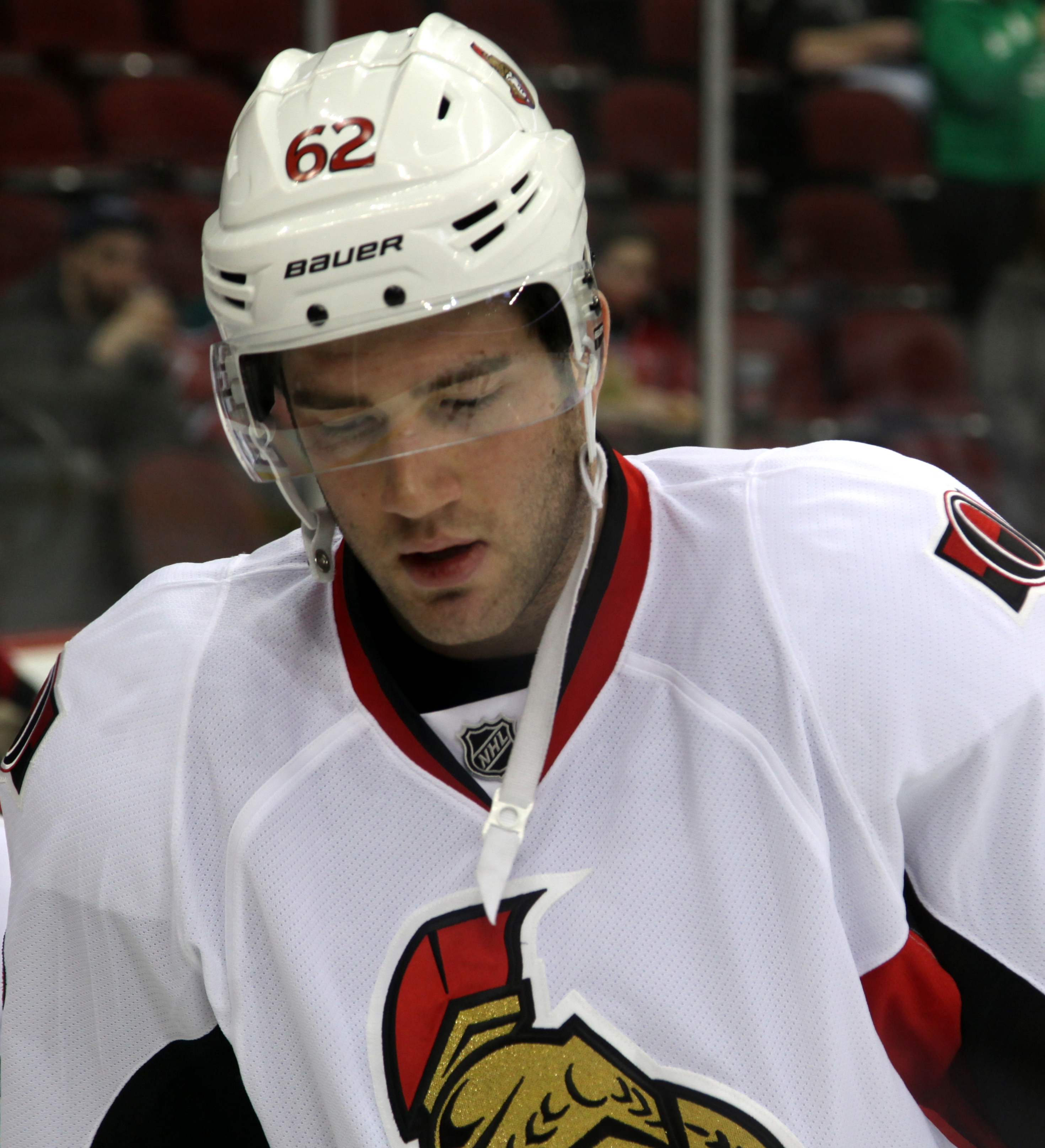 Gryba in 2013.